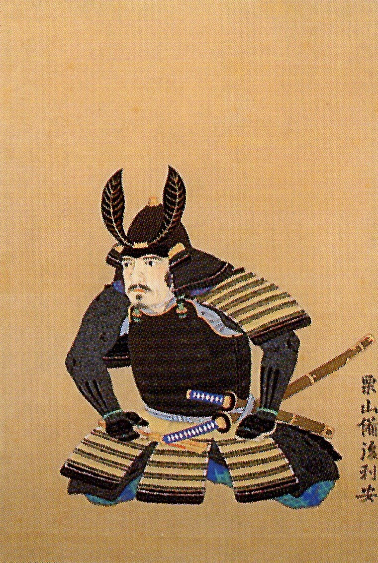 栗山利安の肖像。